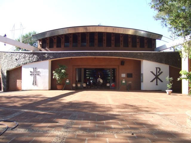 Frente del Santuario Virgen de Itacua.